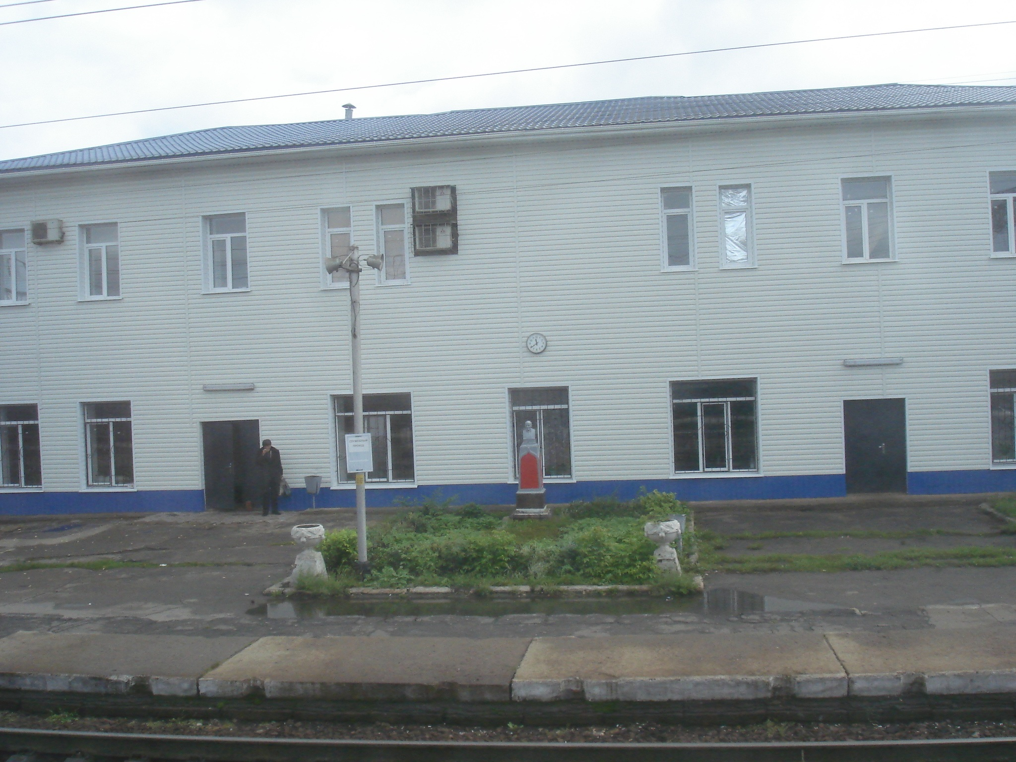 ЖД-станция Новохоперск, здание станции после ремонта